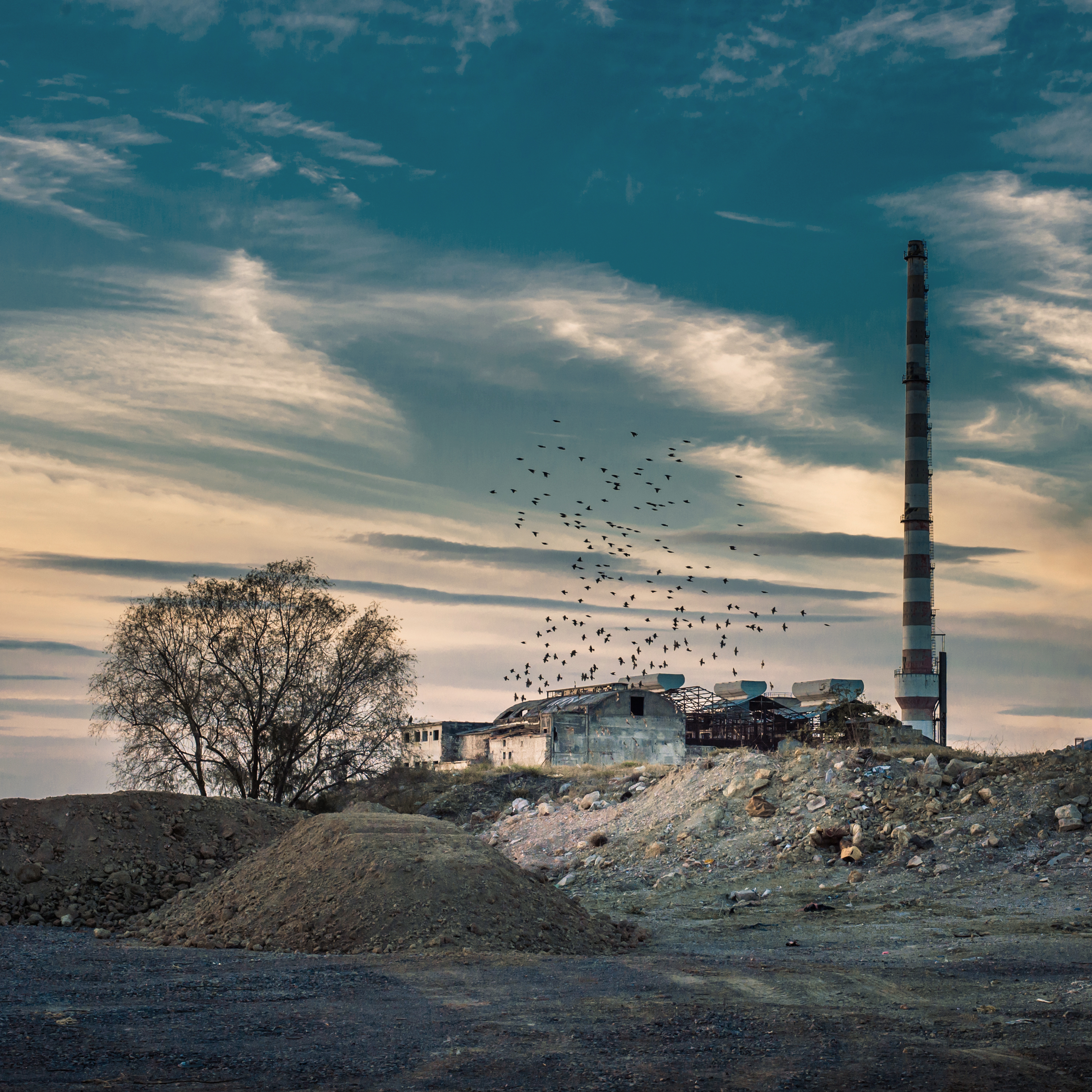 Συγκρότημα Εργοστασίου Λιπασμάτων και Χημικών Προϊόντων («Λιπάσματα Δραπετσώνας»)«Συγκρότημα Εργοστασίου Λιπασμάτων και Χημικών Προϊόντων («Λιπάσματα Δραπετσώνας»)»